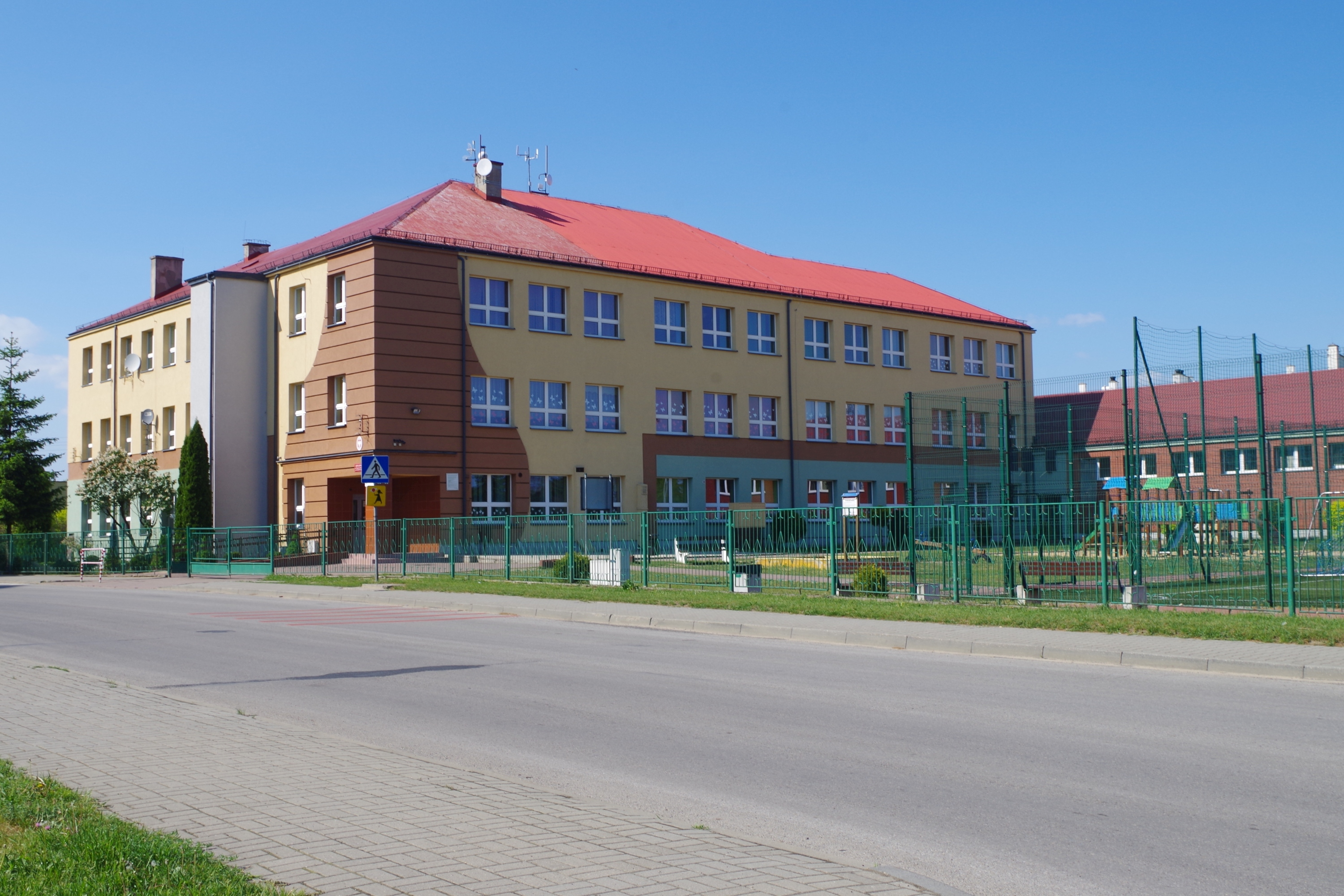 Szkoła we Włodowicach